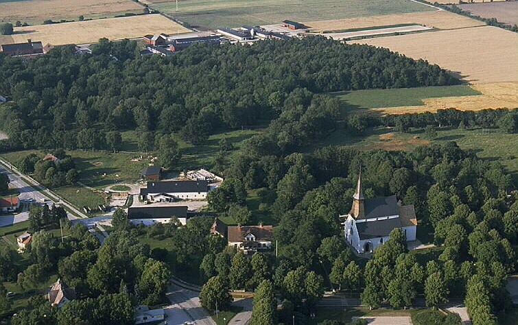 Roma kyrka till höger i bilden. Motiv: Roma Nyckelord: Flygbilder, Riksintressen Kategori: KyrkbyRoma kyrka till höger i bilden.